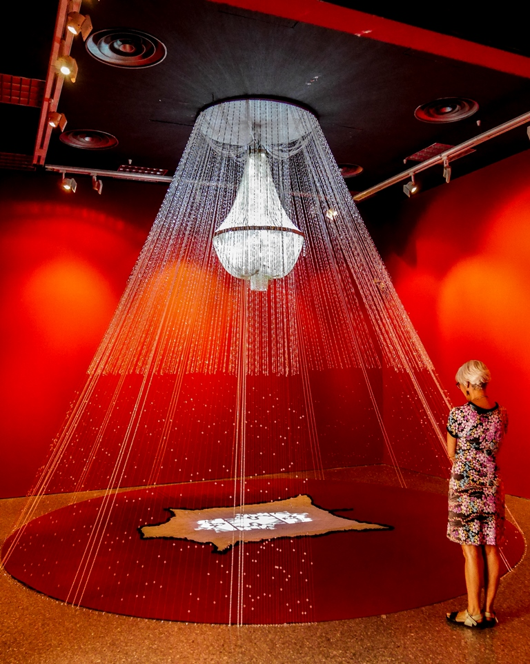 Imatges de l'expòsició Beyond Hollywood. Identitas indígenes nord-americanes. Escena 1. Kent Monkman